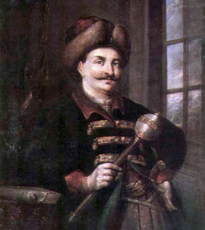 Hetman Michael Chanenko mit Insignie Kommandostab